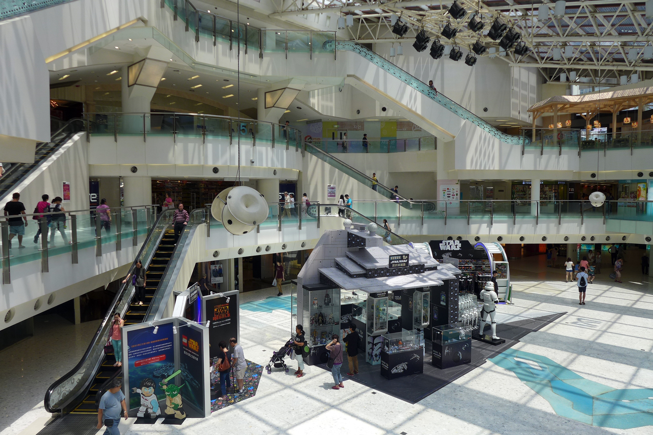 MetroPlaza Void